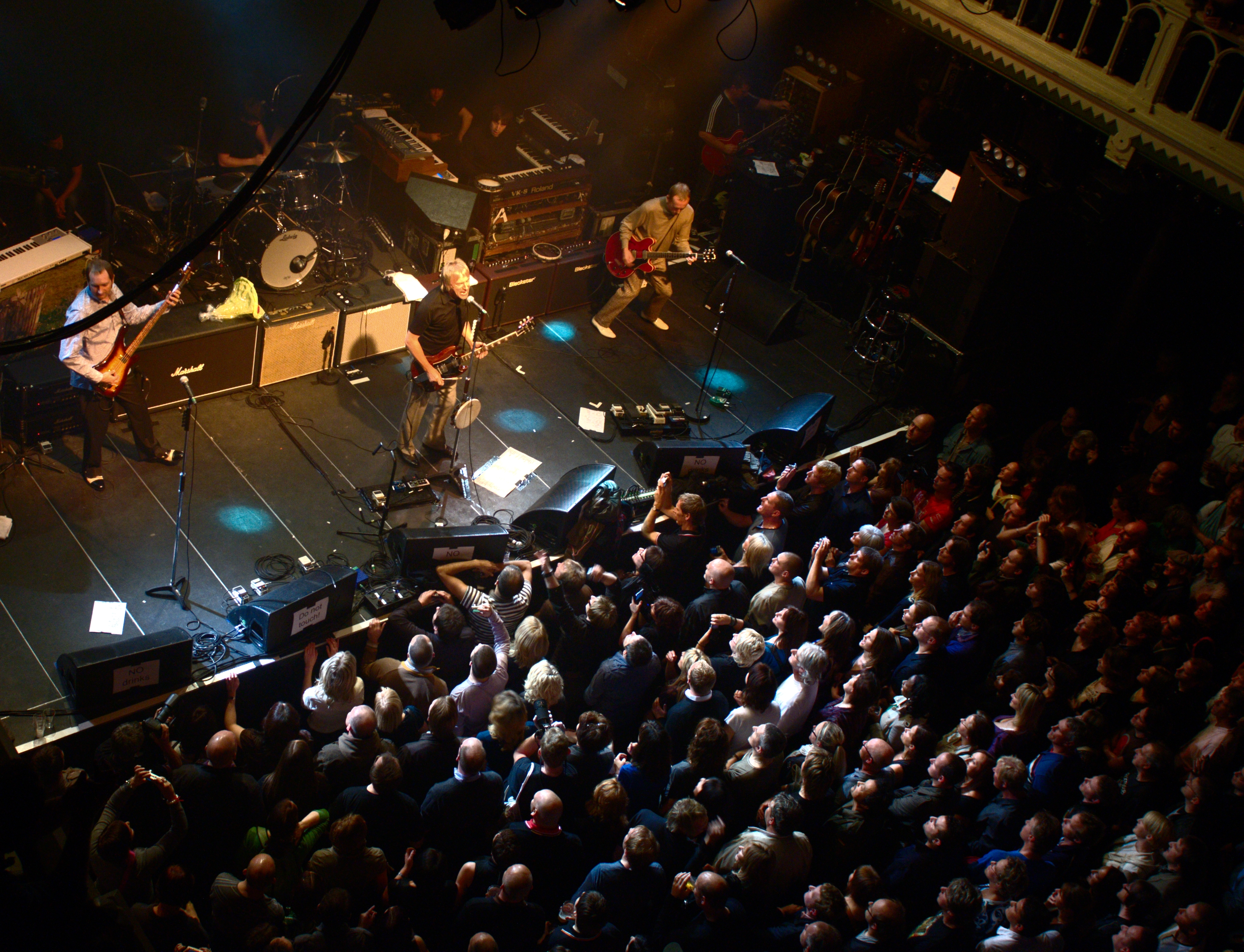 Concert de Paul Weller le 4/09/08 au Paradiso à Amsterdam